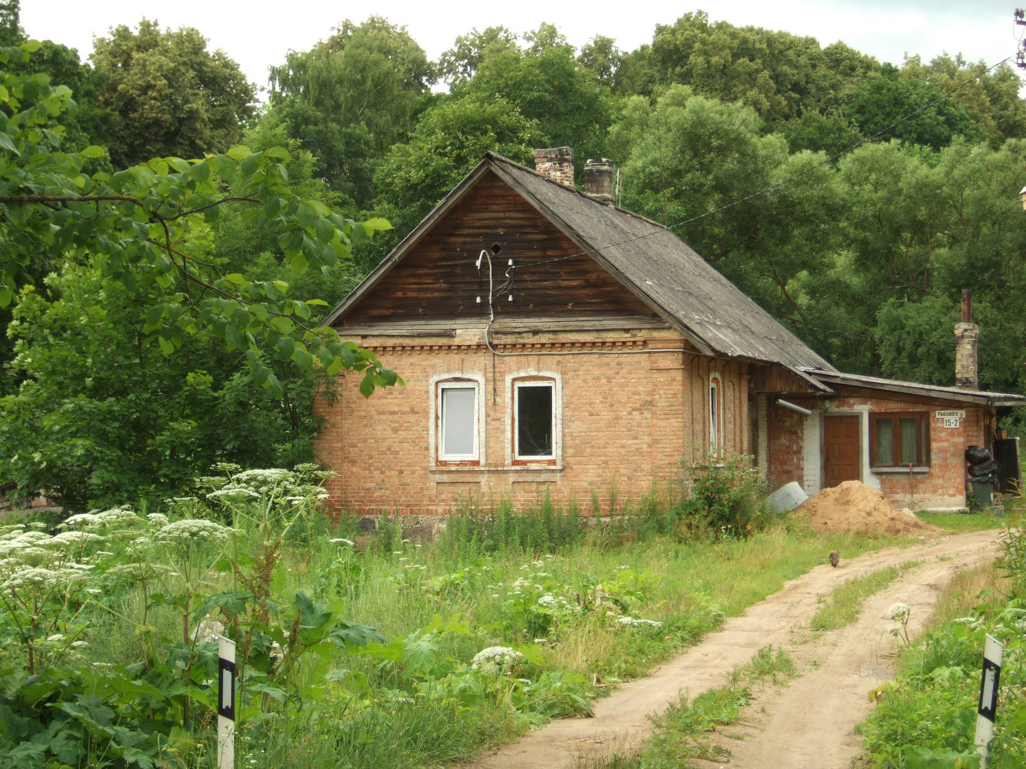 Naujanerių dvaro oficina